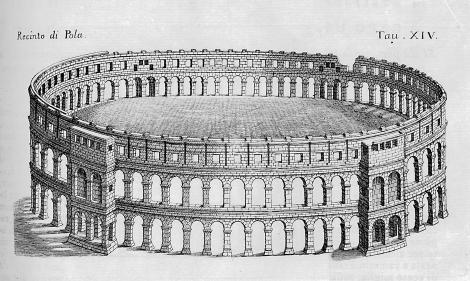 Amphitheater in Pula (Dalmatien); aus: Francesco Scipione Maffei: De gli Anfiteatri e singolarmente del Veronese libri due. Verona, Giovanni Alberto Tumermani, 1728.